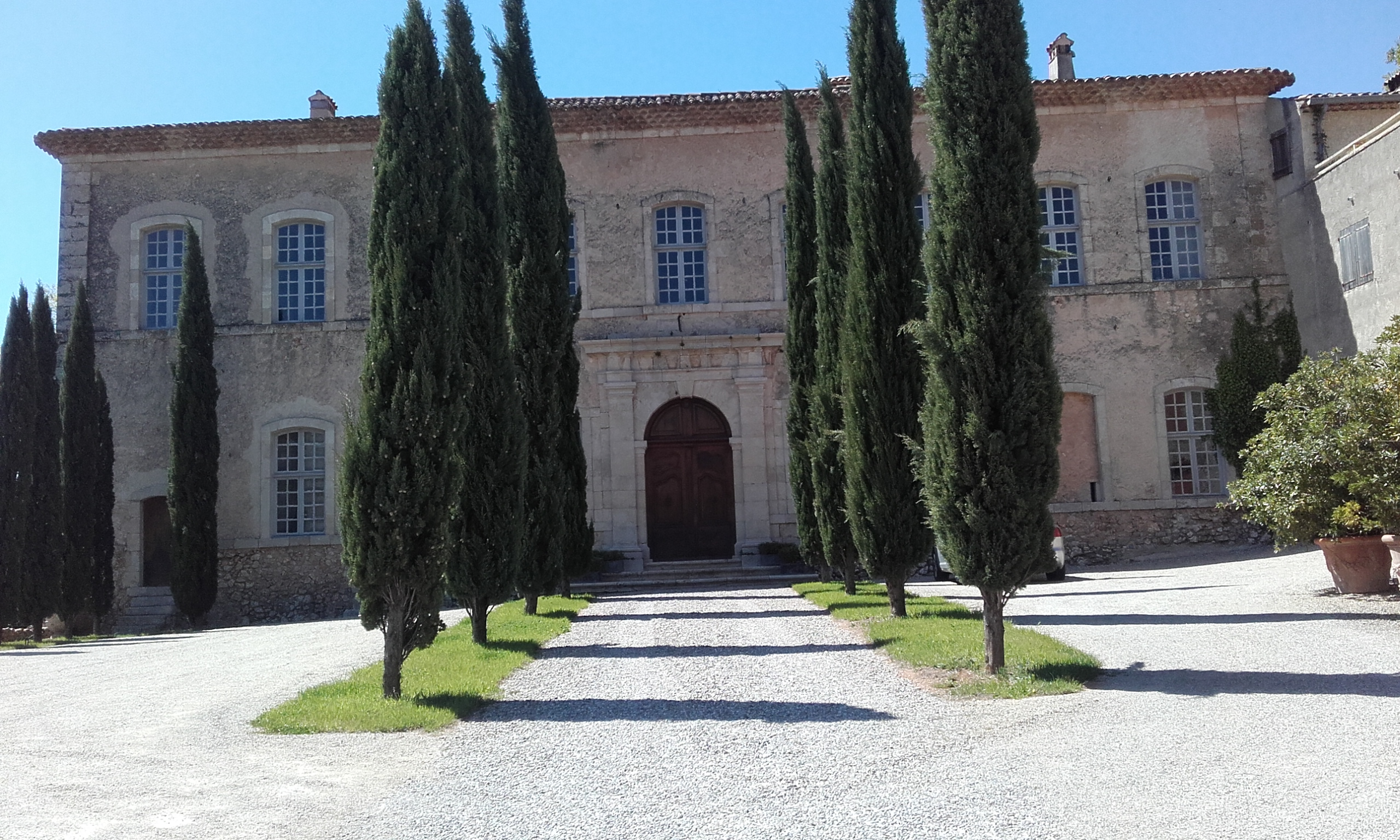 Var, Moissac-Bellevue, Château, façade entrée principale.